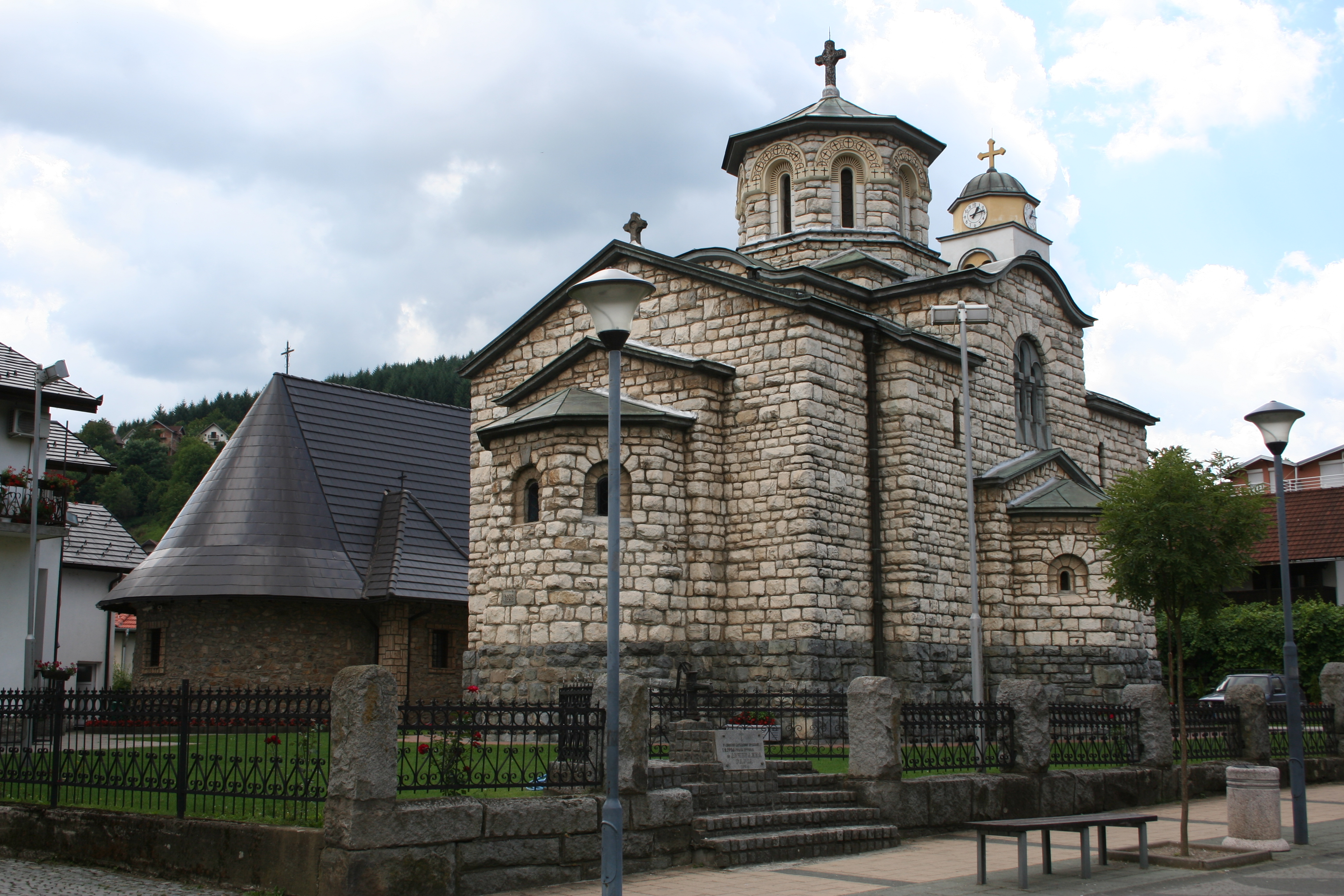 Crkva Vaznesenja Gospodnjeg (nova), Krupanj